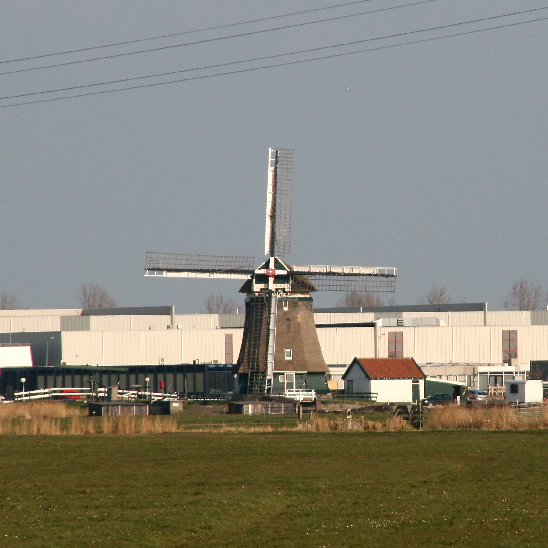 Krommeniedijk: molen De Woudaap